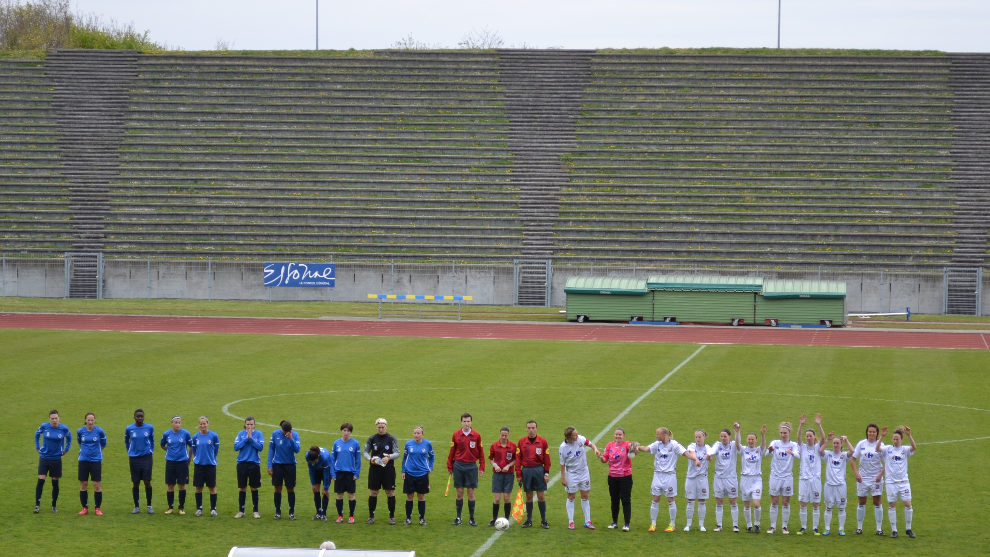 (17e journées, 8/4/2012)